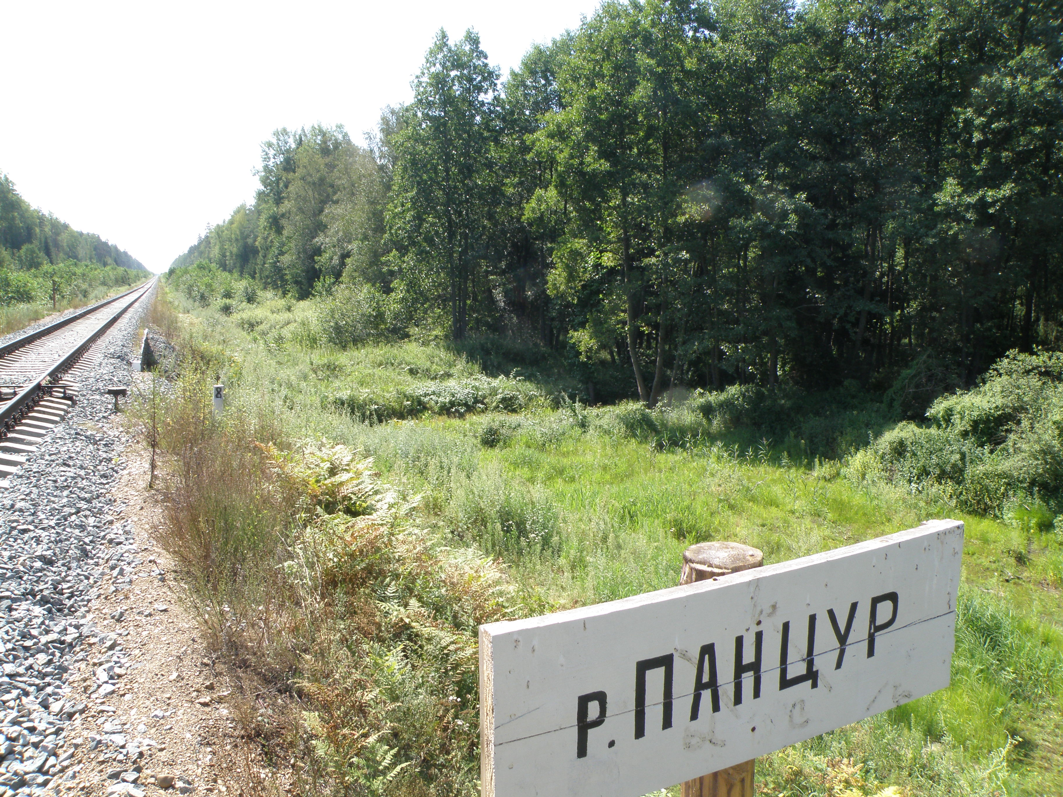 Пересечение Пынсура с Тумской ж.-д. веткой